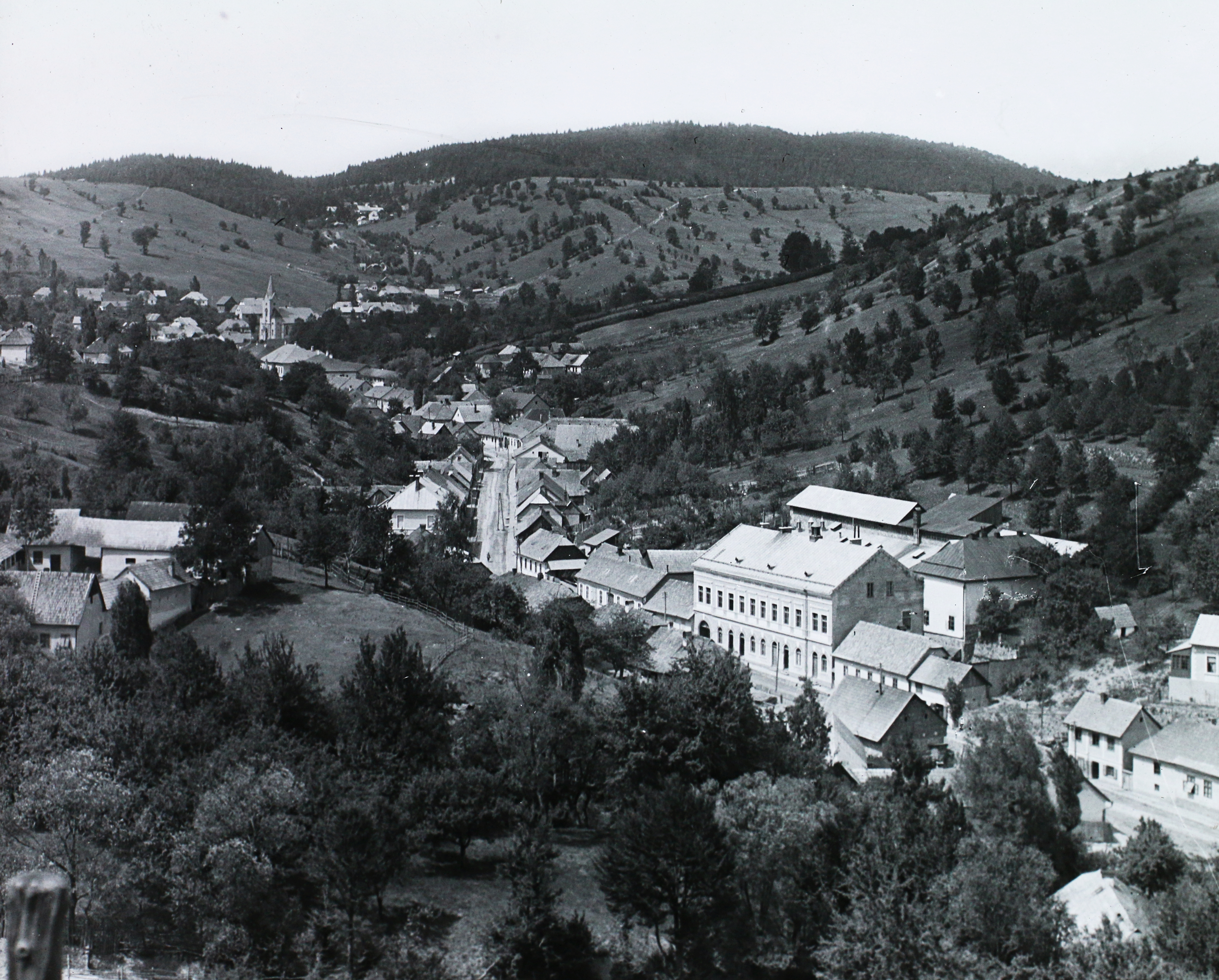 Stájerlak (ekkor önálló, ma a város része) látképe. Location: Romania, Transylvania, Anina Tags: picture, bird's eye view Title: Stájerlak (ekkor önálló, ma a város része) látképe.